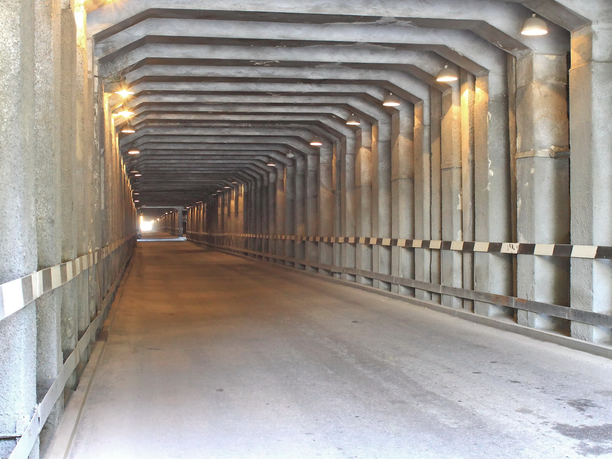 Тоннель КМК